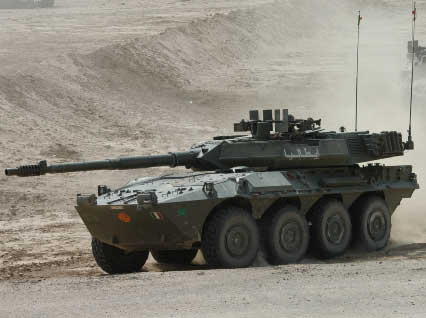 Blindo centauro, esercito italiano